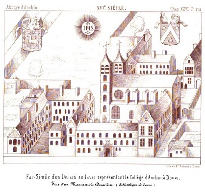 Abbaye d'Anchin - Le collége de Douai